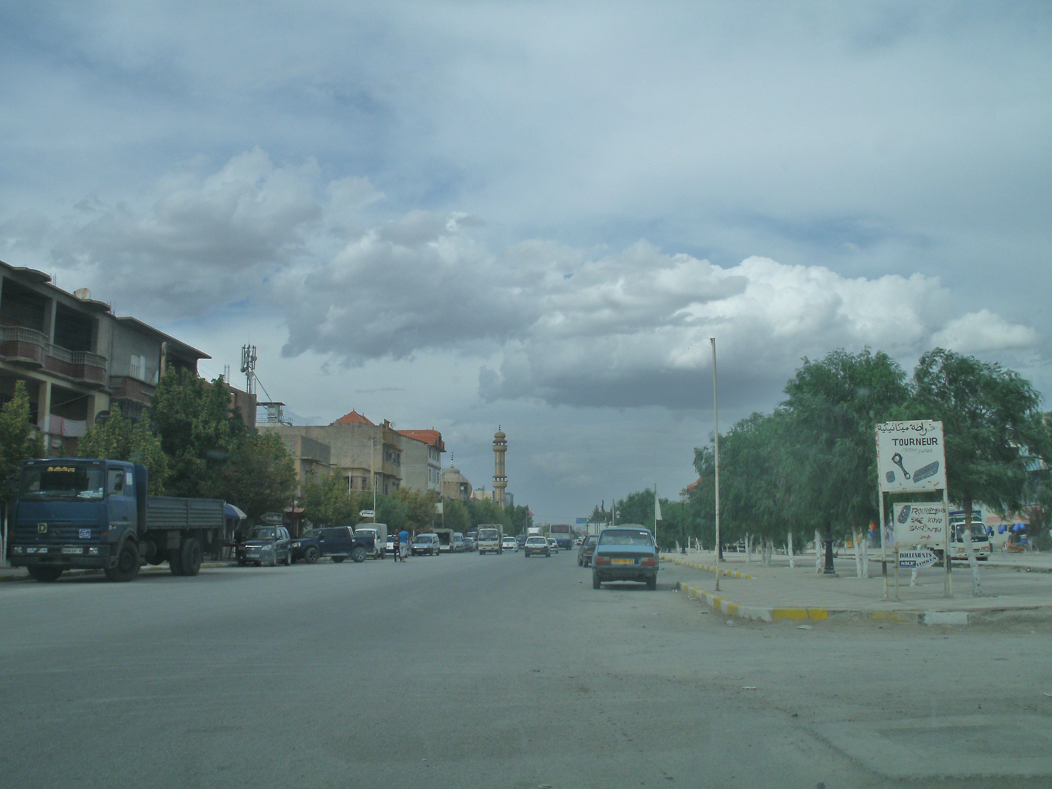 L'agglomération de Aïn Oulmane dans la wilaya de Sétif